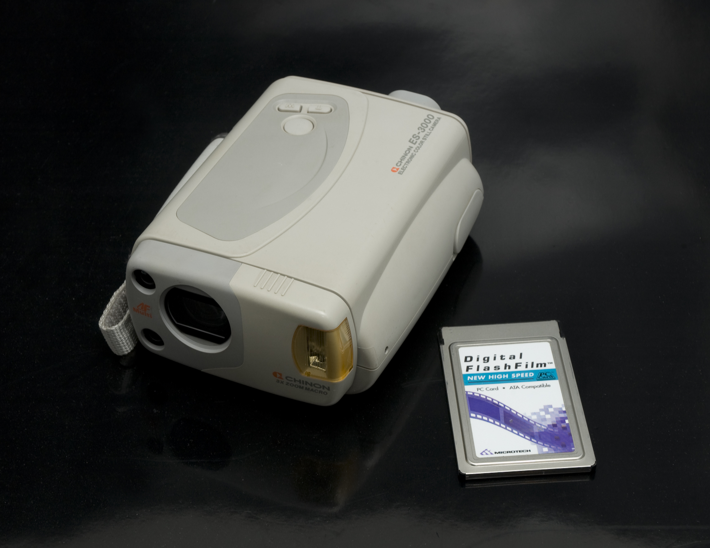 Chinon es-3000